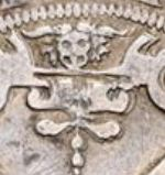 Maskaron über dem Wappenschild des Talers auf die Einnahme von Gotha